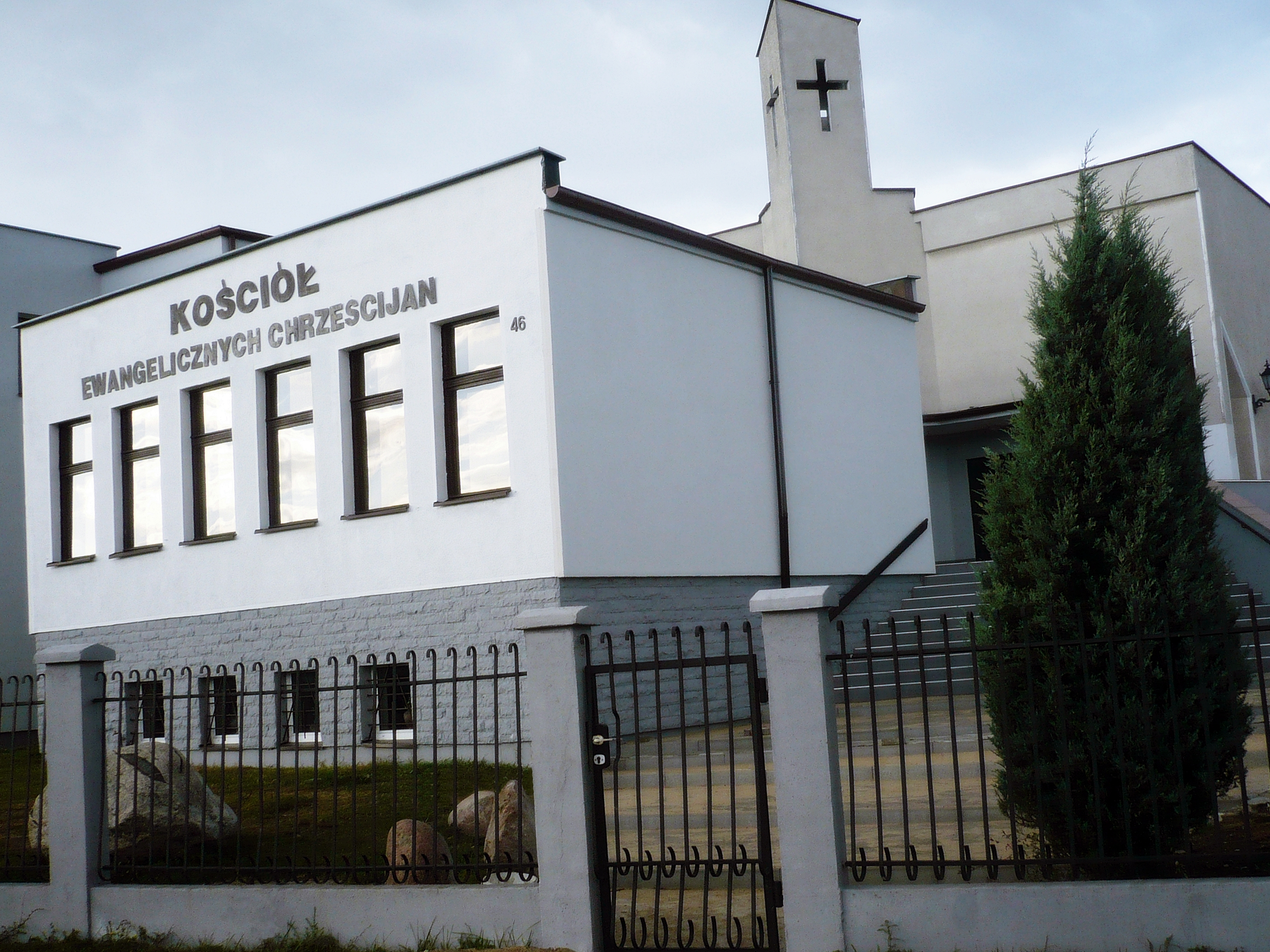 Kościół Ewangeliczny w Bydgoszczy (Evangelical Church in Bydgoszcz)